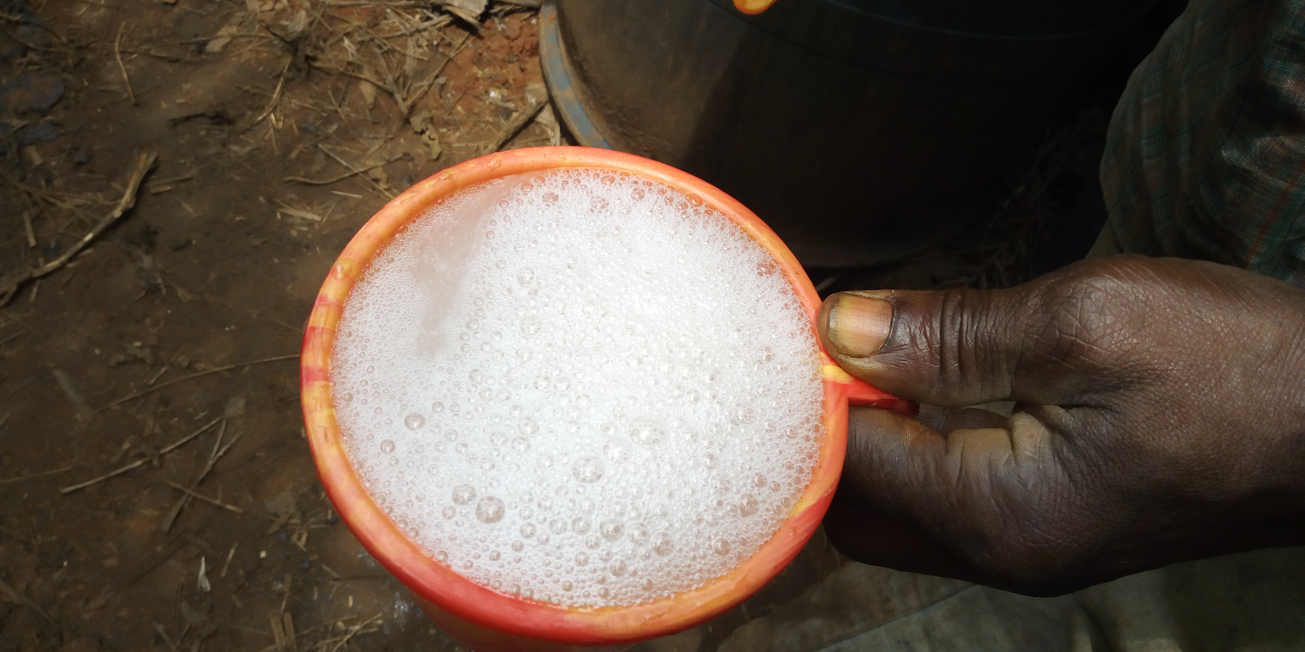 Vin de palm dasn un bol